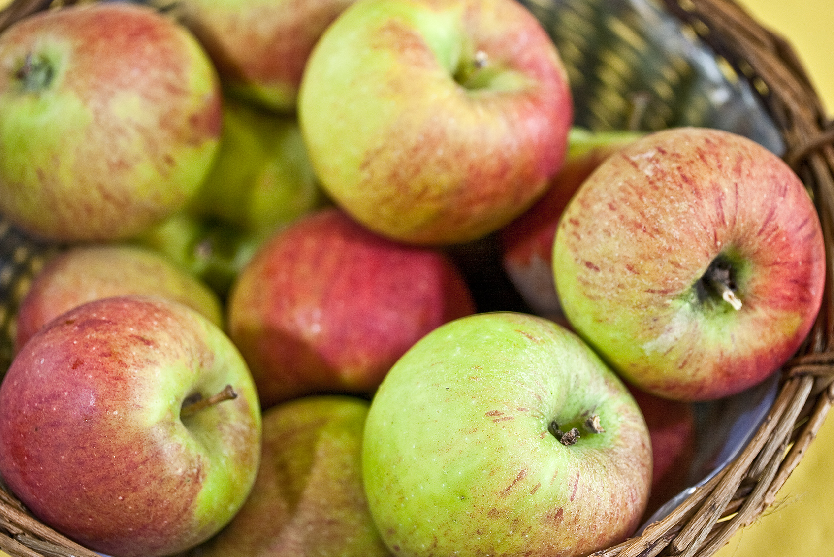 Der Pilot ist eine Apfelsorte